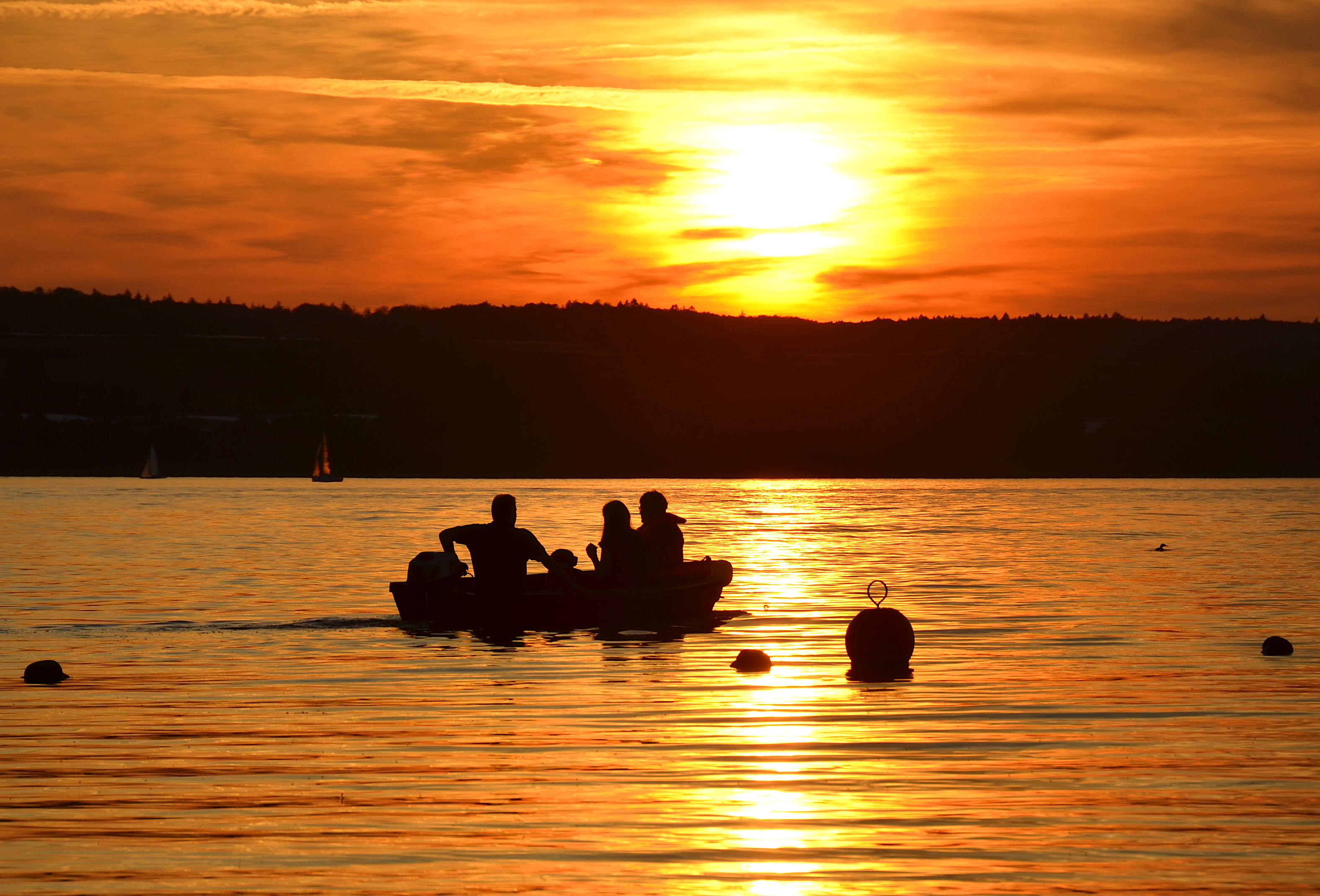 Sonnenuntergang am Bodensee